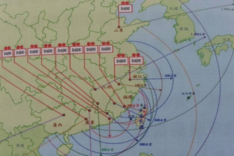 中國二砲部隊對台部署導彈示意圖（翻攝報告書)